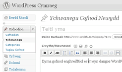 Sginlun o baneli rheoli Cymraeg WordPress